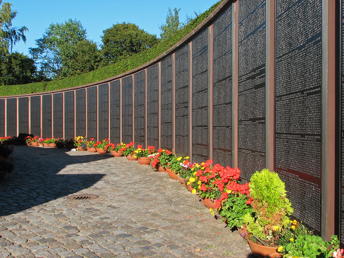 Beschreibung: U-Boot-Ehrenmal Möltenort' / Heikendorf Gedankestätte für die gefallenen Ubootfahrer der deutschen Marine Fotograf: Darkone, 3. September 2005